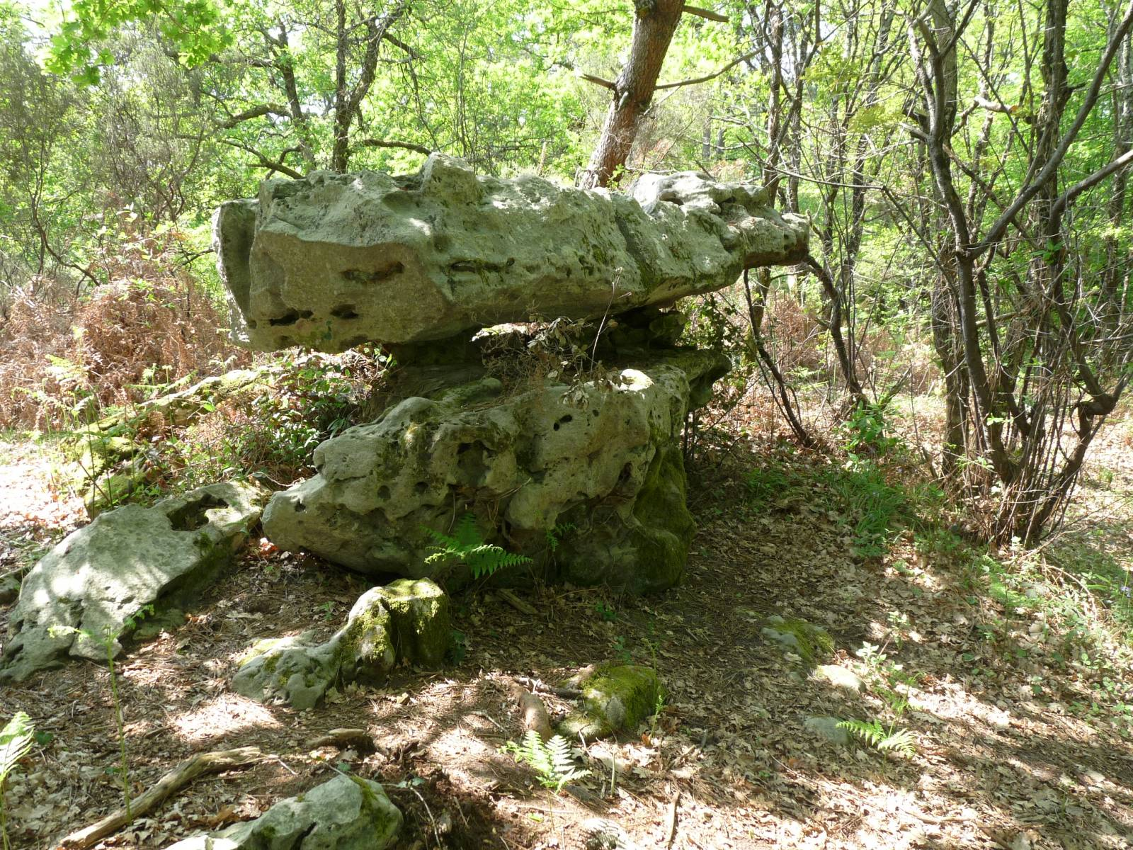 Rocher de la Vache près du dolmen de Garde-Epée, St-Brice, Charente, France